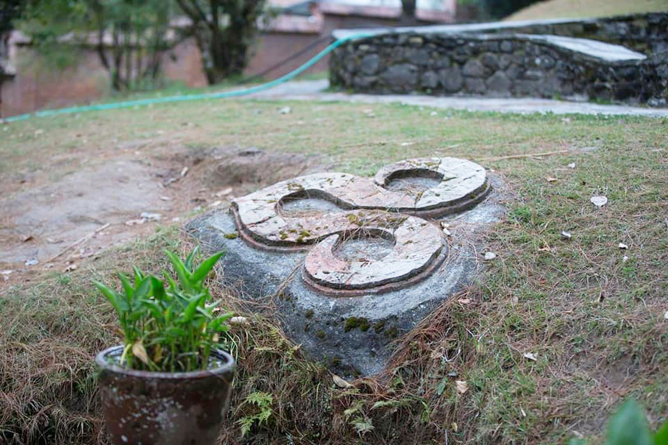 Thai Airways Flight 311 Memorial Park - Kakani, Nepal